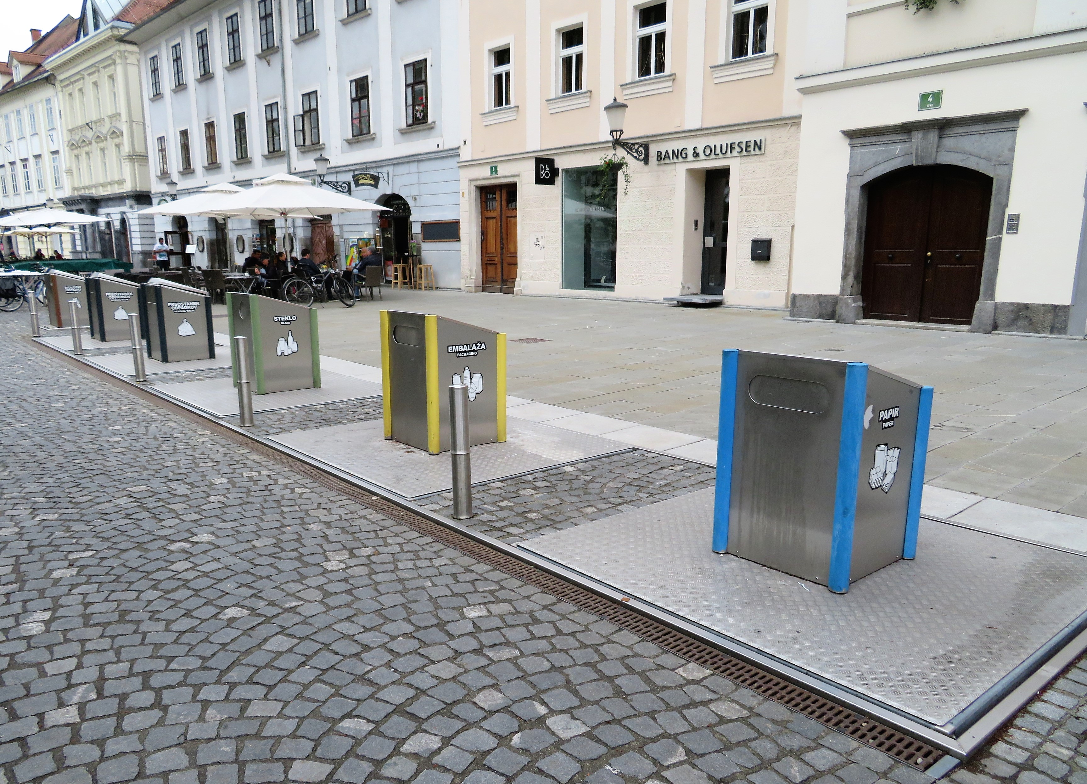 Afvalcontainers in Ljubljana, Slovenië